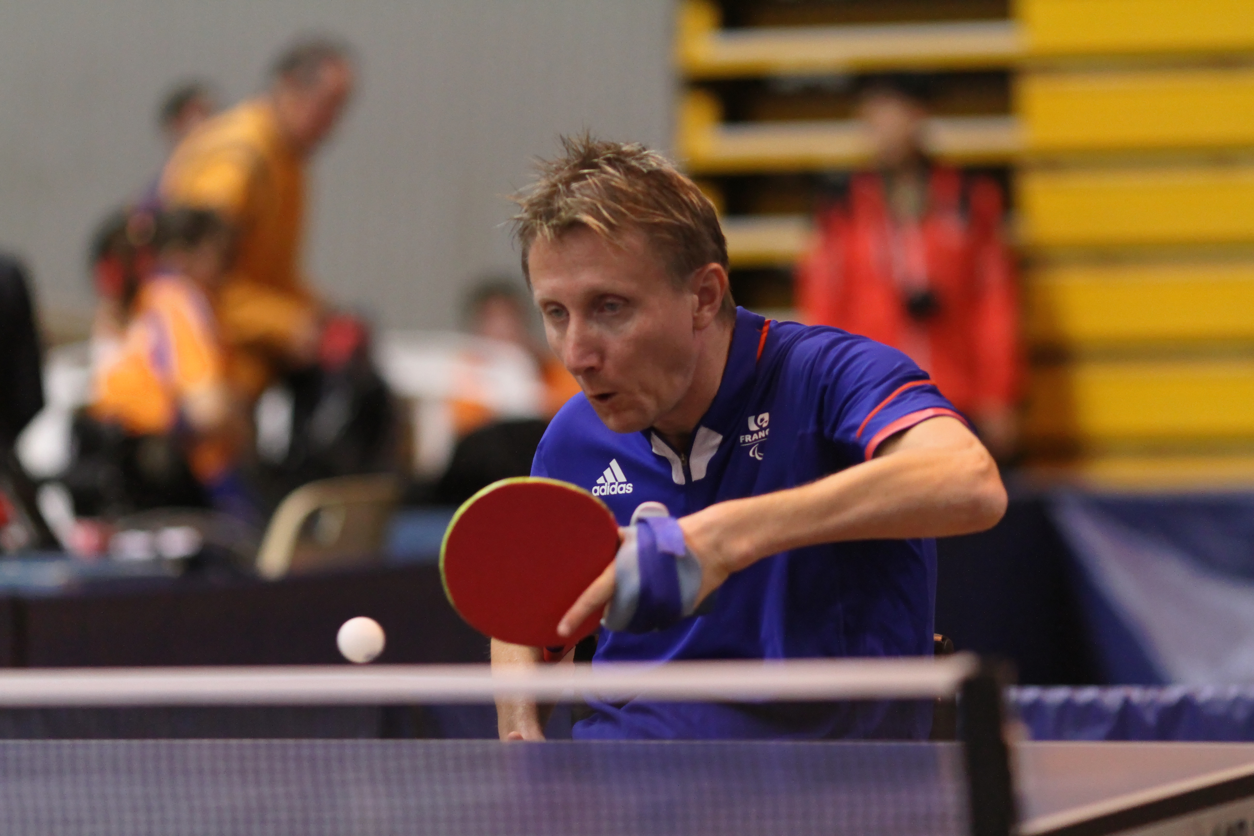 MOLLIENS Stéphane (FRA) IMG_2768_DxO